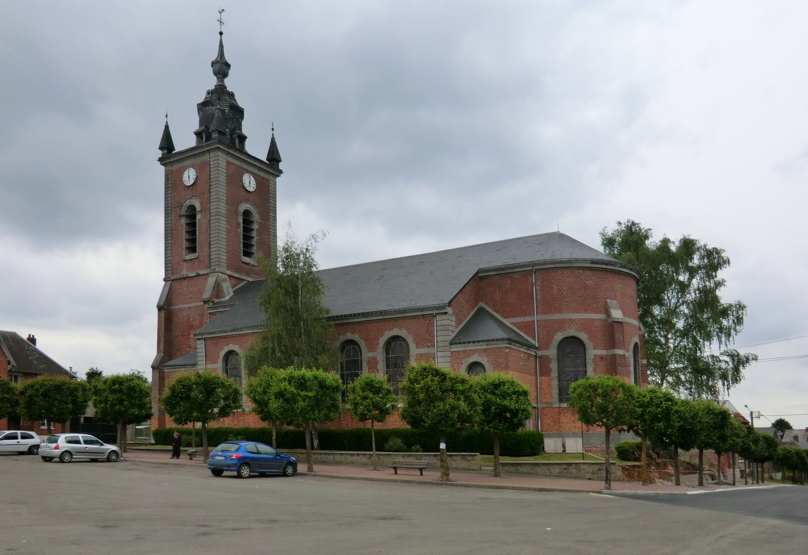 Catillon-sur-Sambre, France